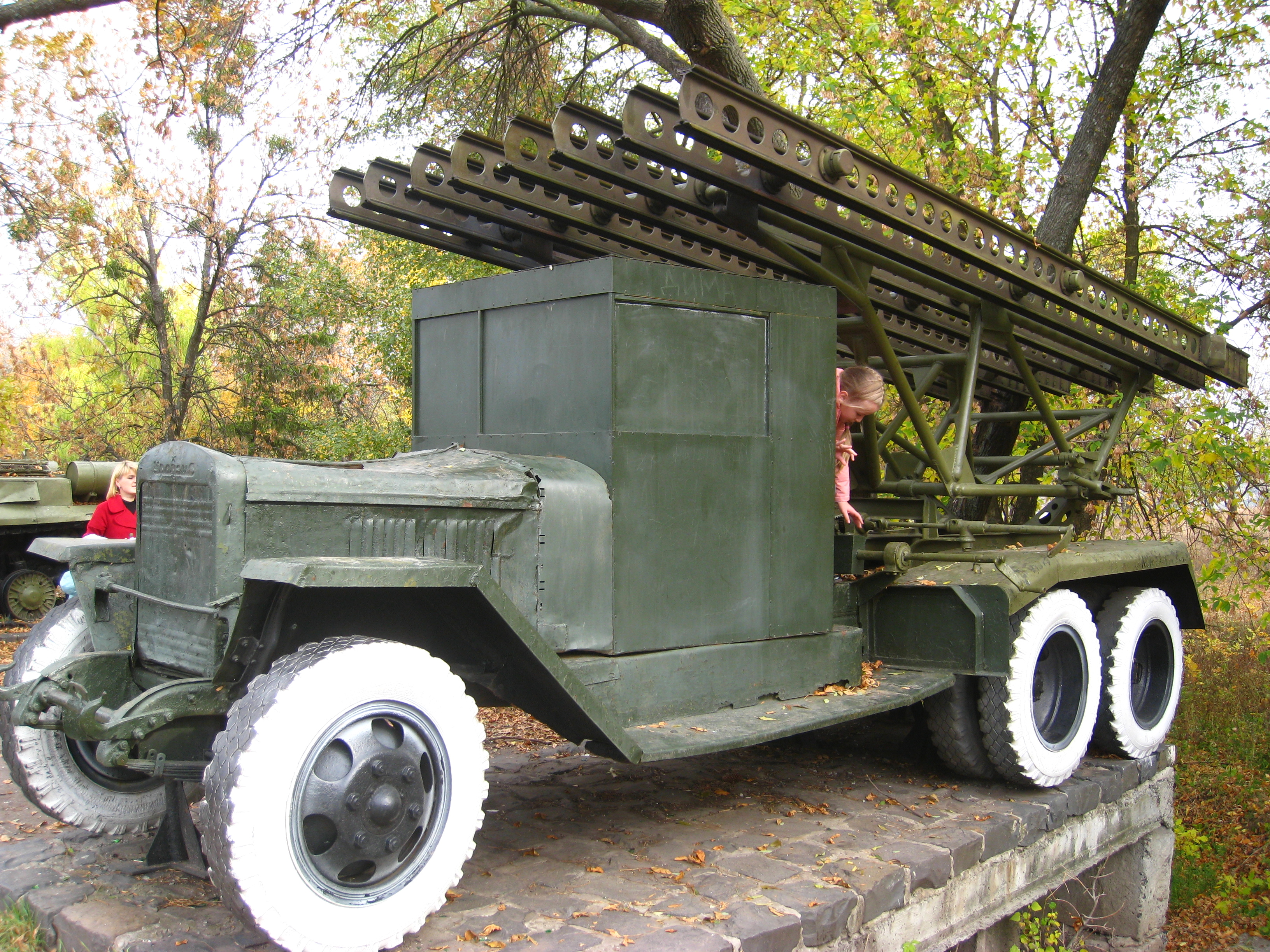 Меморіальний комплекс на честь загиблих воїнів-визволителів, Ізюм, гора Крем'янець, південно-східна частина міста